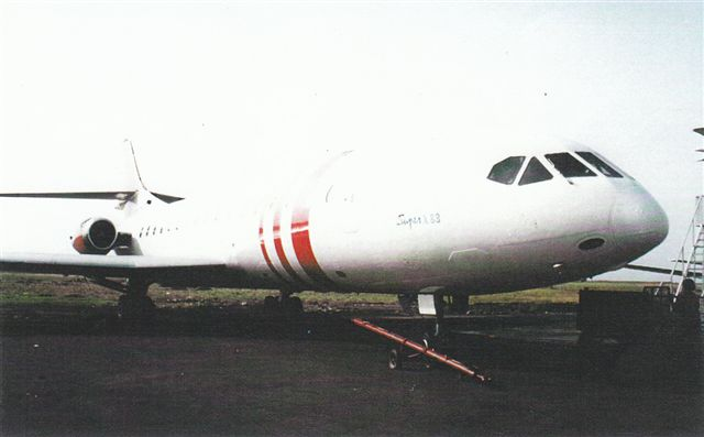 Caravelle 10B3 9Q-CPI au parking de Kinshasa/Ndjili